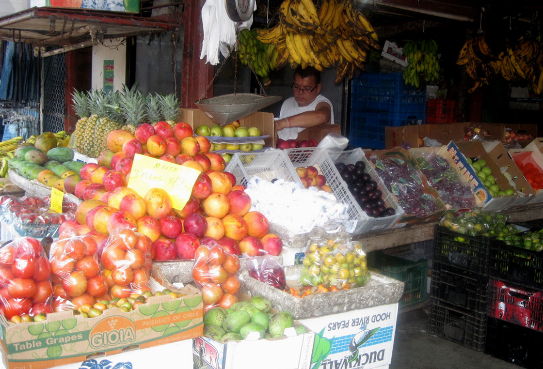 Feria de frutas en Limón, Costa Rica.